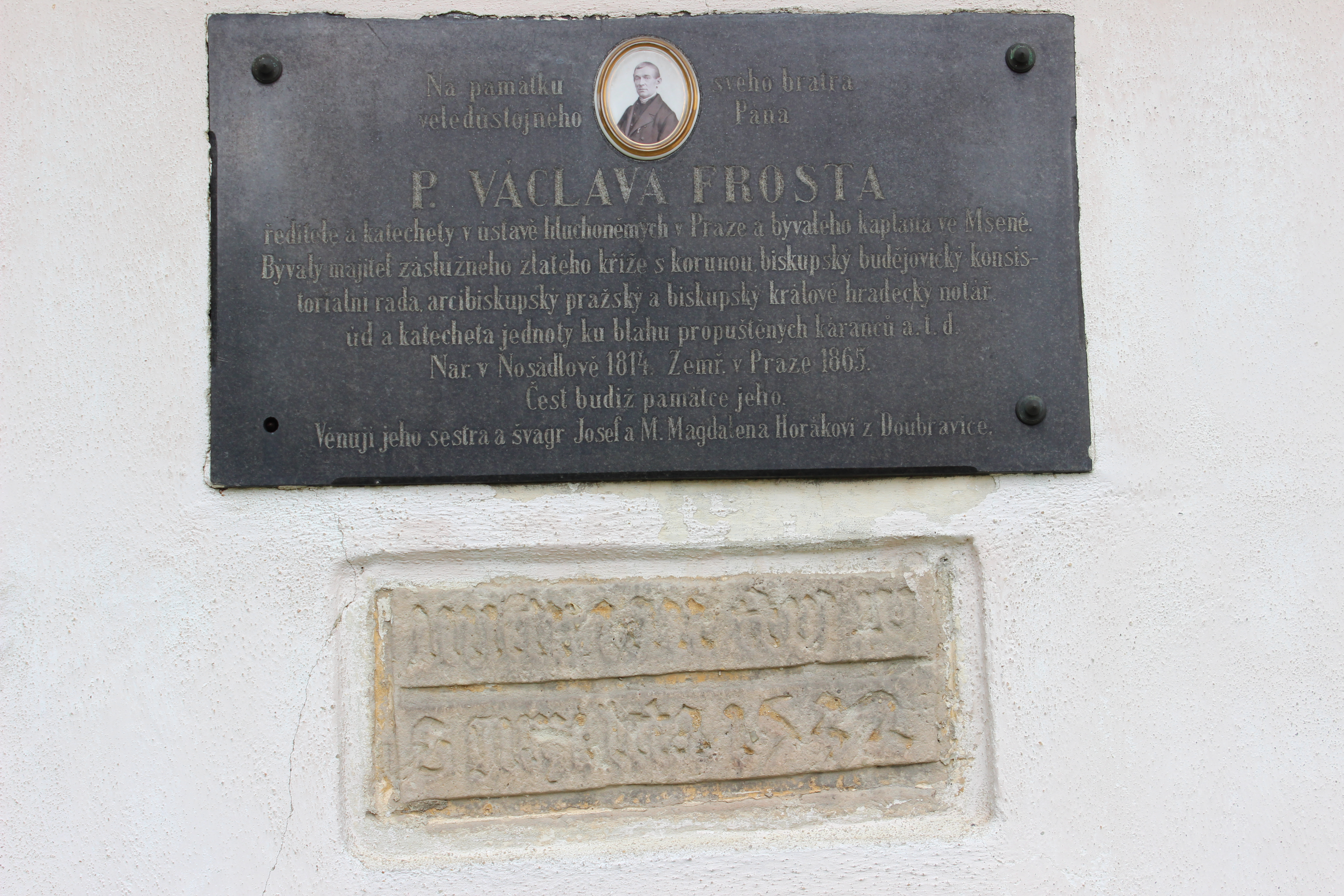 Pamětní deska na hřbitově v Lobči, která je věnovaná českému pedagogovi Václavovi Frostovi, jenž byl roku 1837 dosazen jako kaplan do Mšena, kde z vlastního popudu začal vyučovat hluchoněmé děti z okolí. Project: Fotíme Česko